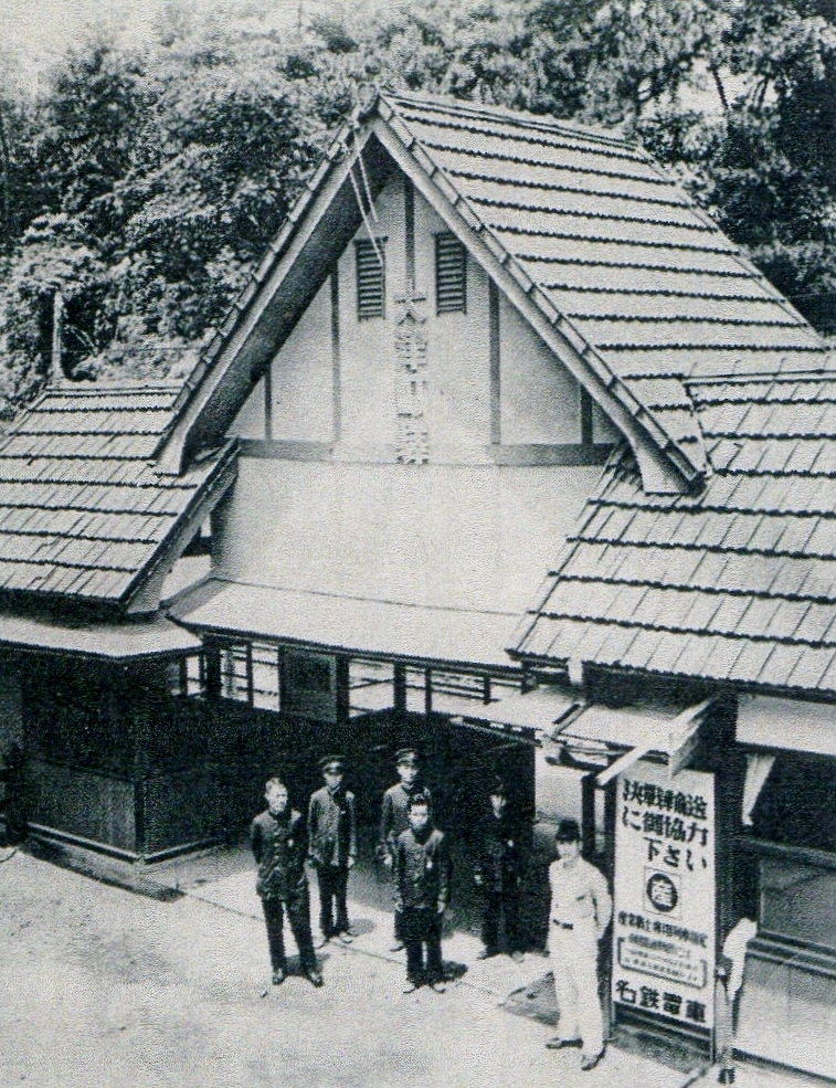 戦時中の大津町駅